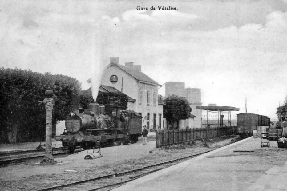 Les quais de la gare avec une locomotive à vapeur.